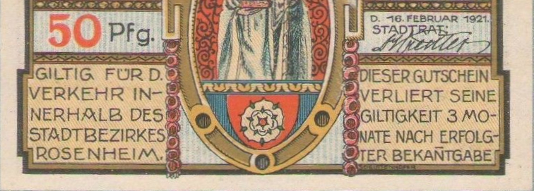 Notgeld der Stadt Rosenheim 1921 (50 Pfennig) mit der Unterschrift des Oberbürgermeisters Bruno Kreuter (Ausschnitt).